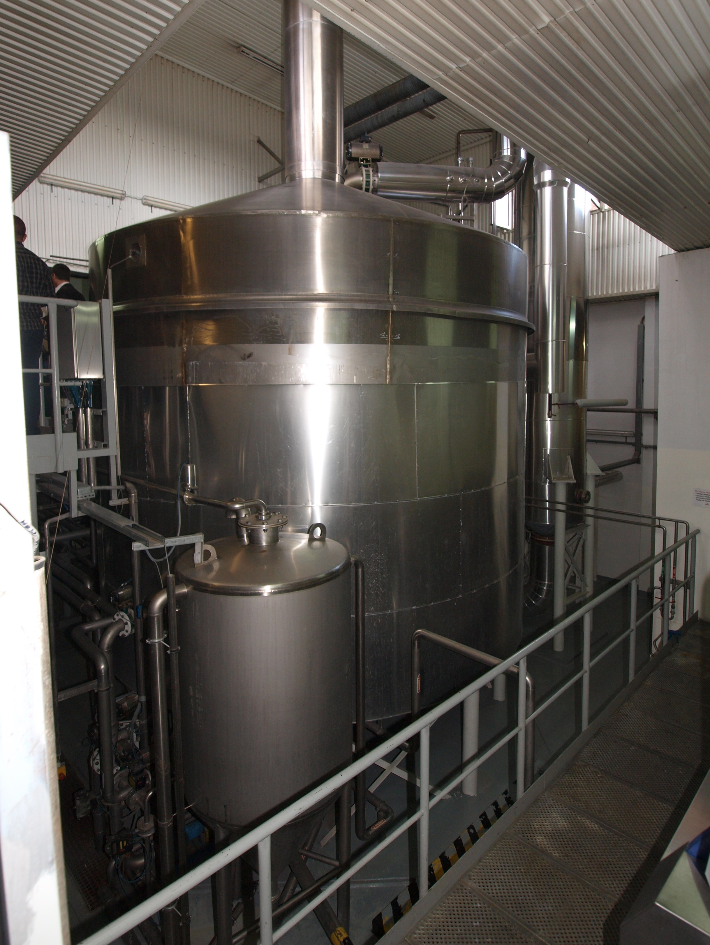 Browary Górnośląskie w Zabrzu. Warzelnia. Kadź zacierowa..